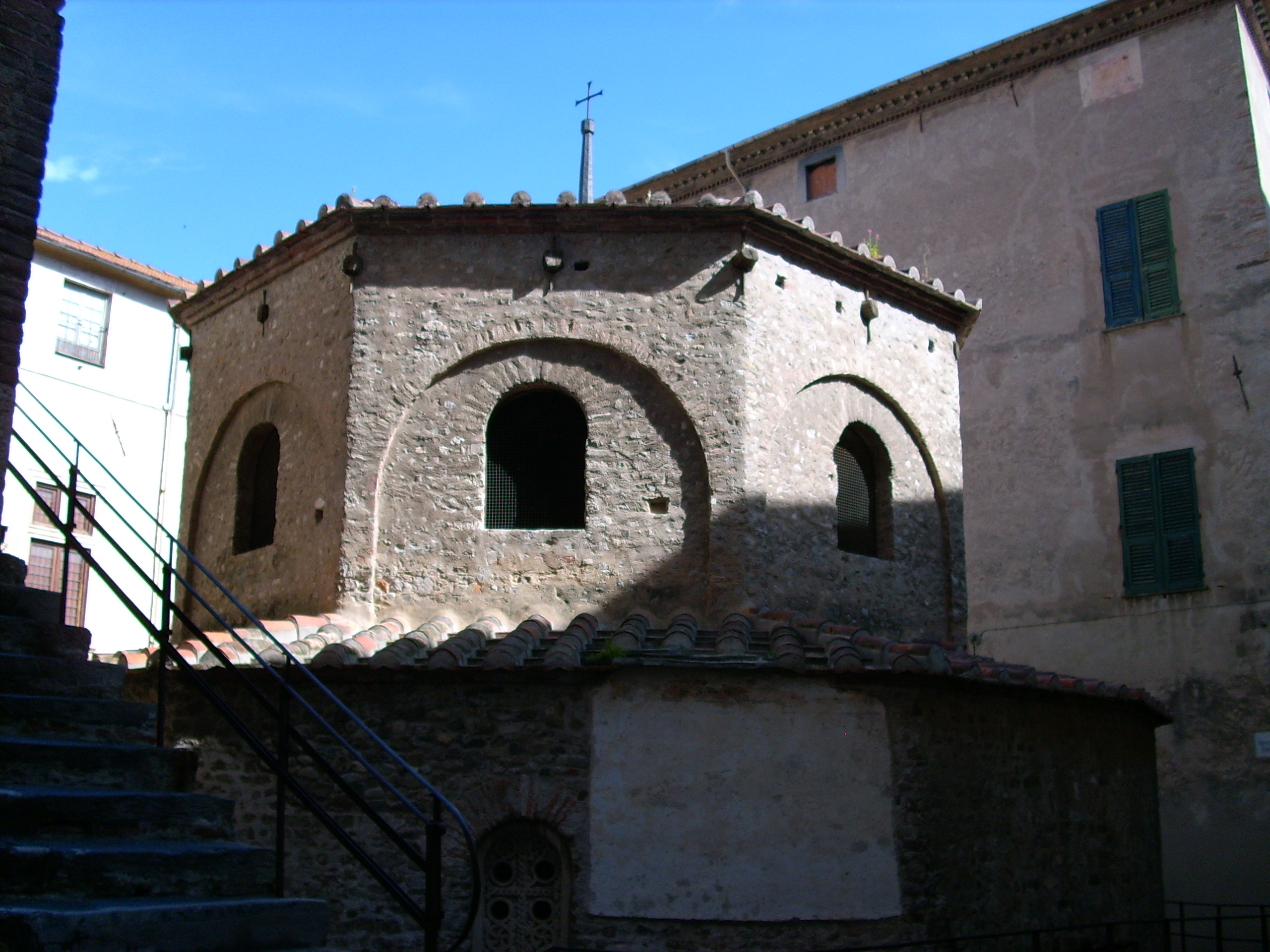 Battistero di Albenga, Liguria, Italia